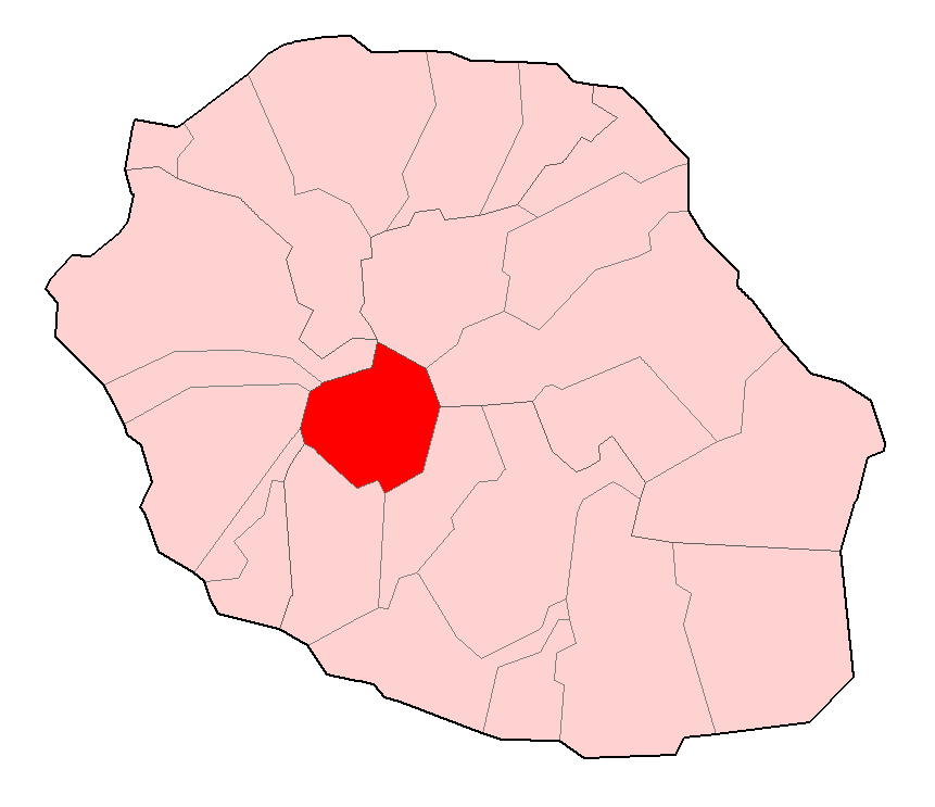 Carte de la Réunion permettant de localiser Cilaos.